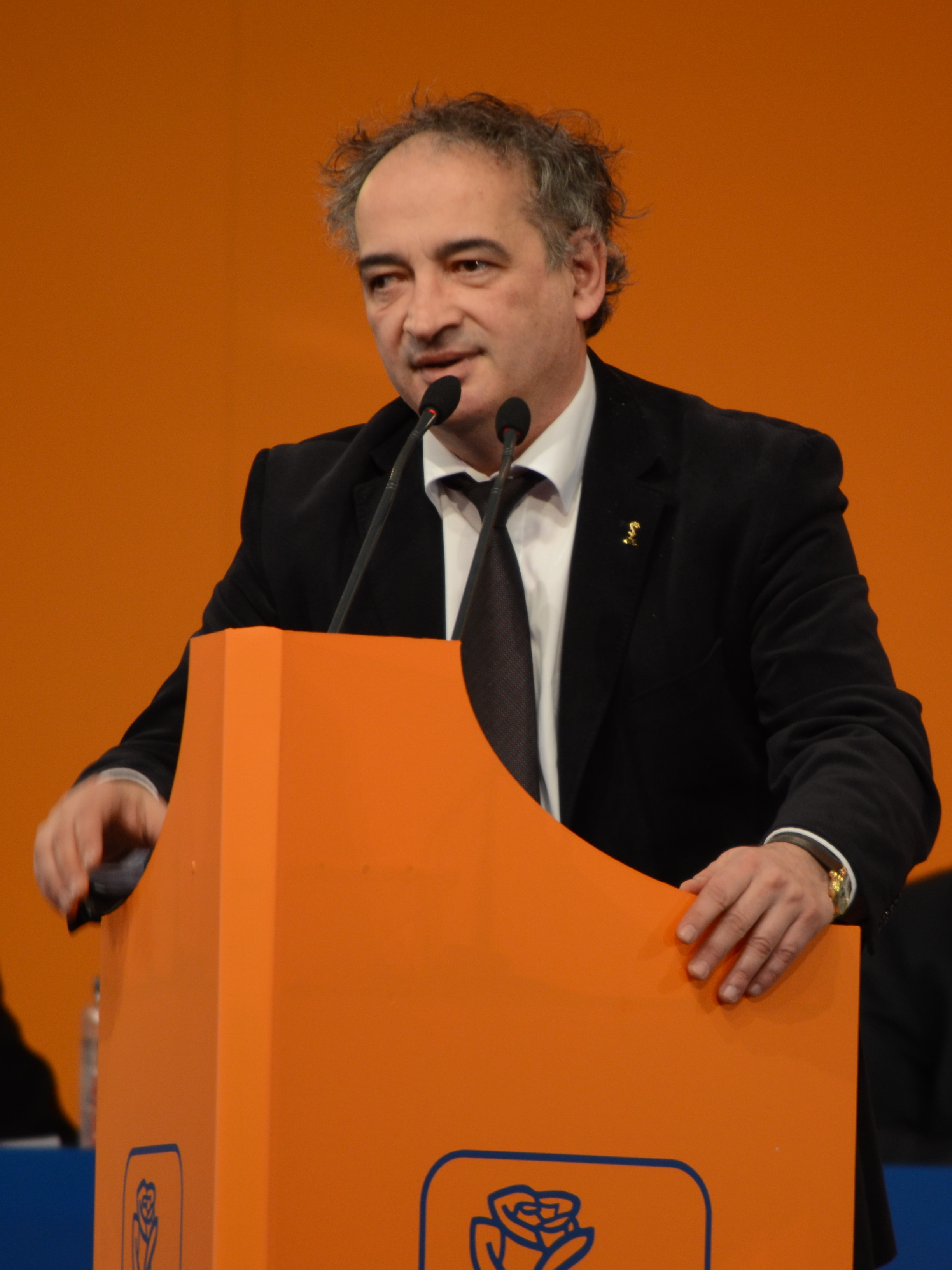 Traian Ungureanu (la Convenția națională extraordinară a Partidului Democrat-Liberal, 23 martie 2013)